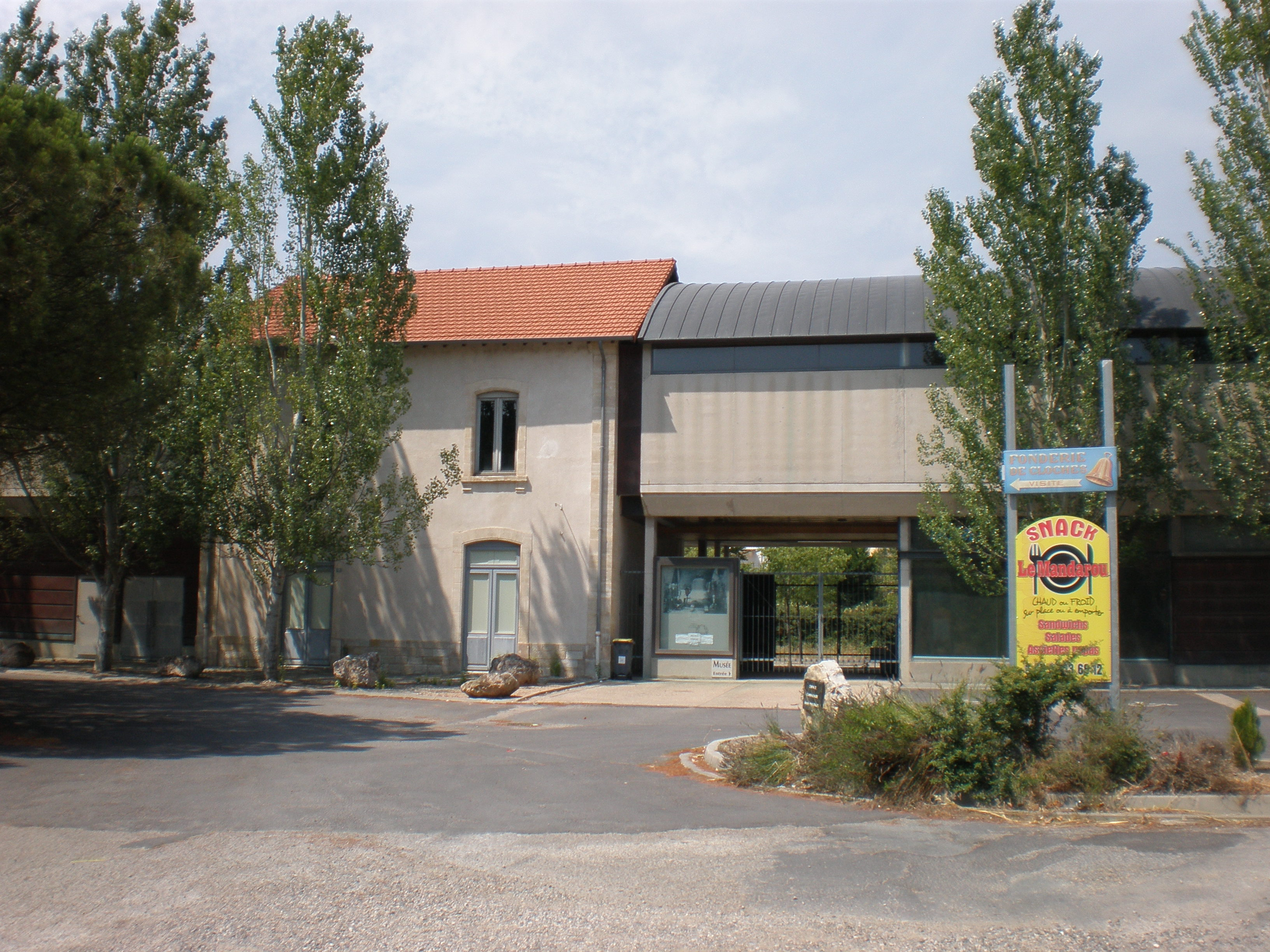 La fonderie de cloches Granier d'Hérépian (Hérault, 34), ancienne gare du village